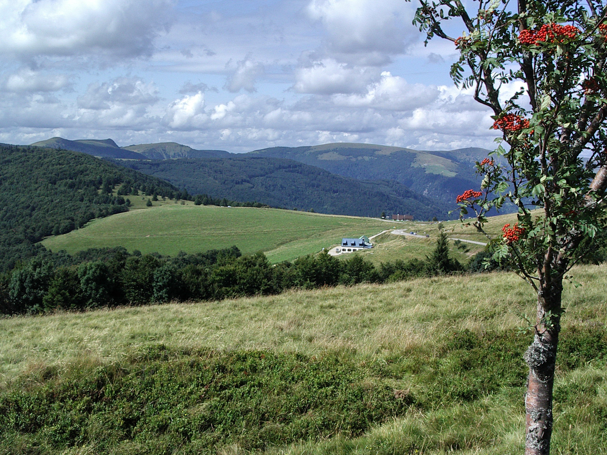 Le massif du Hohneck, et la ferme auberge du Hannenbrunnen (altitude 1180 m) dans la commune de Lautenbach (68610), vus depuis la route des crétes, Alsace, France.